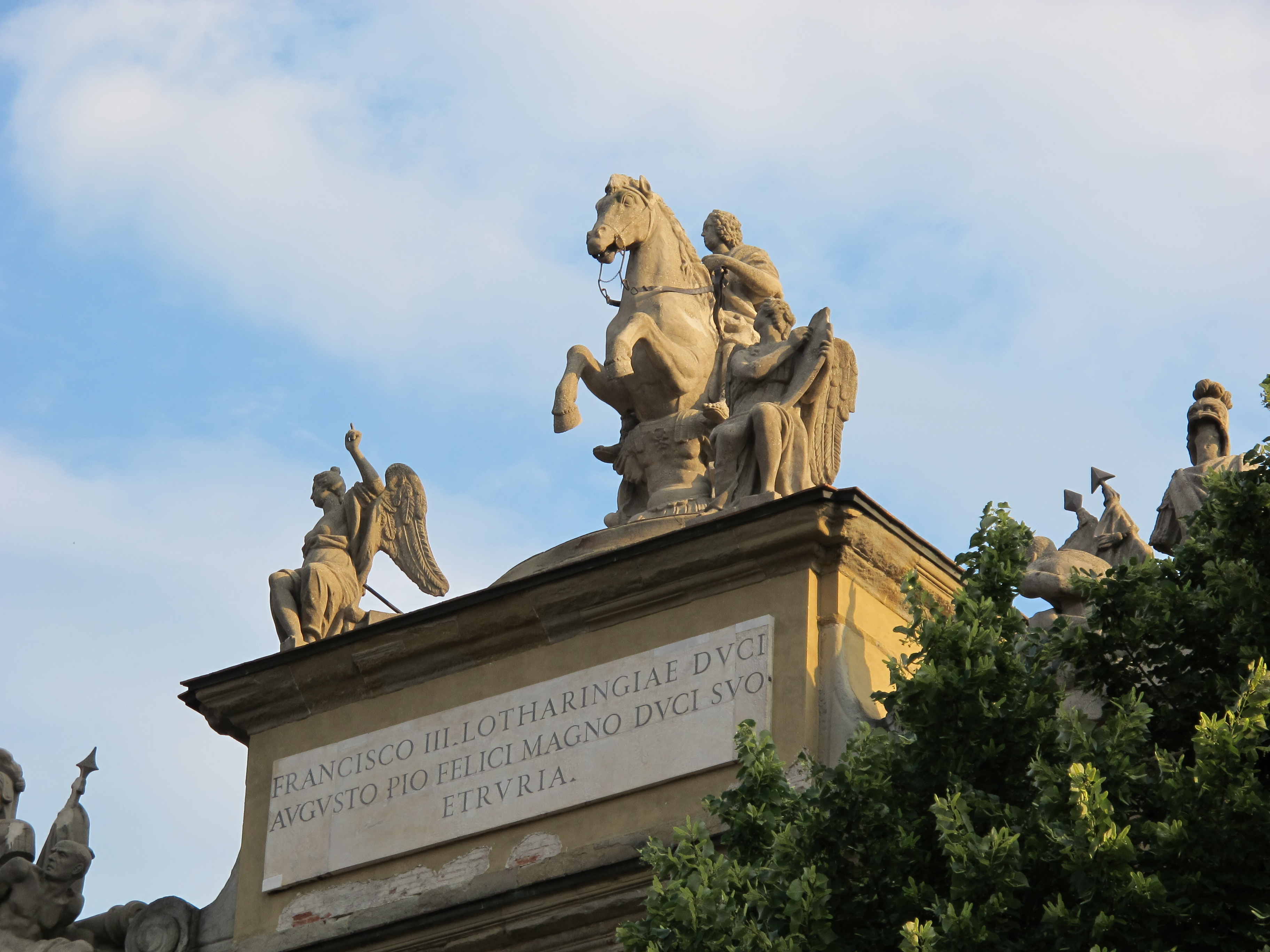 Arco di trionfo, firenze